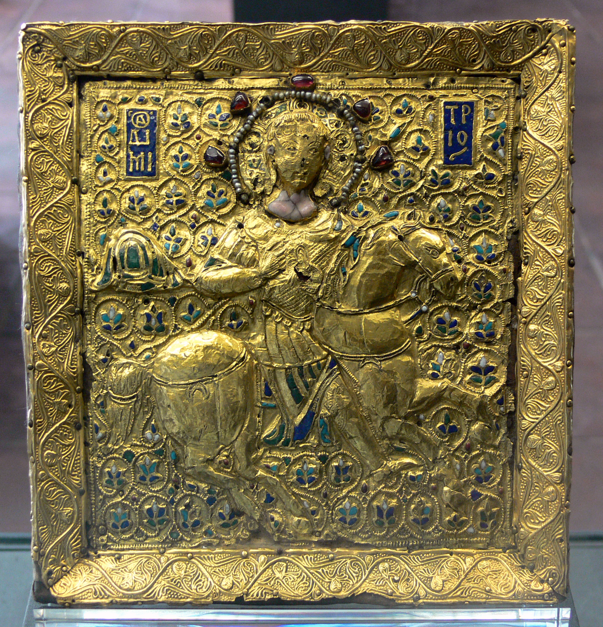 Goldikone mit dem hl. Demetrios; Gold und Reste von Email; byzantinisch, 12. Jh. Kunstgewerbemuseum Berlin, Inv.-Nr. W3